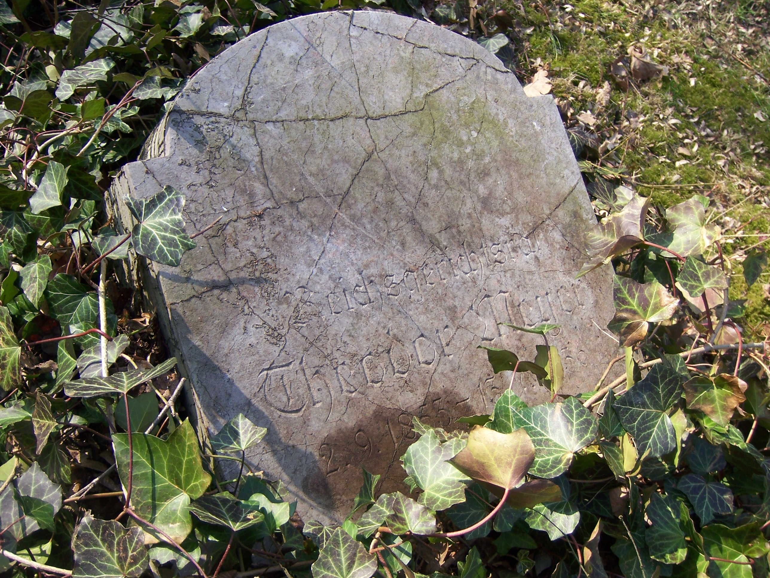 Grabstätte Reichsgerichtsrat Theodor Meyer. (Grabstelle 2016 aufgelassen.)